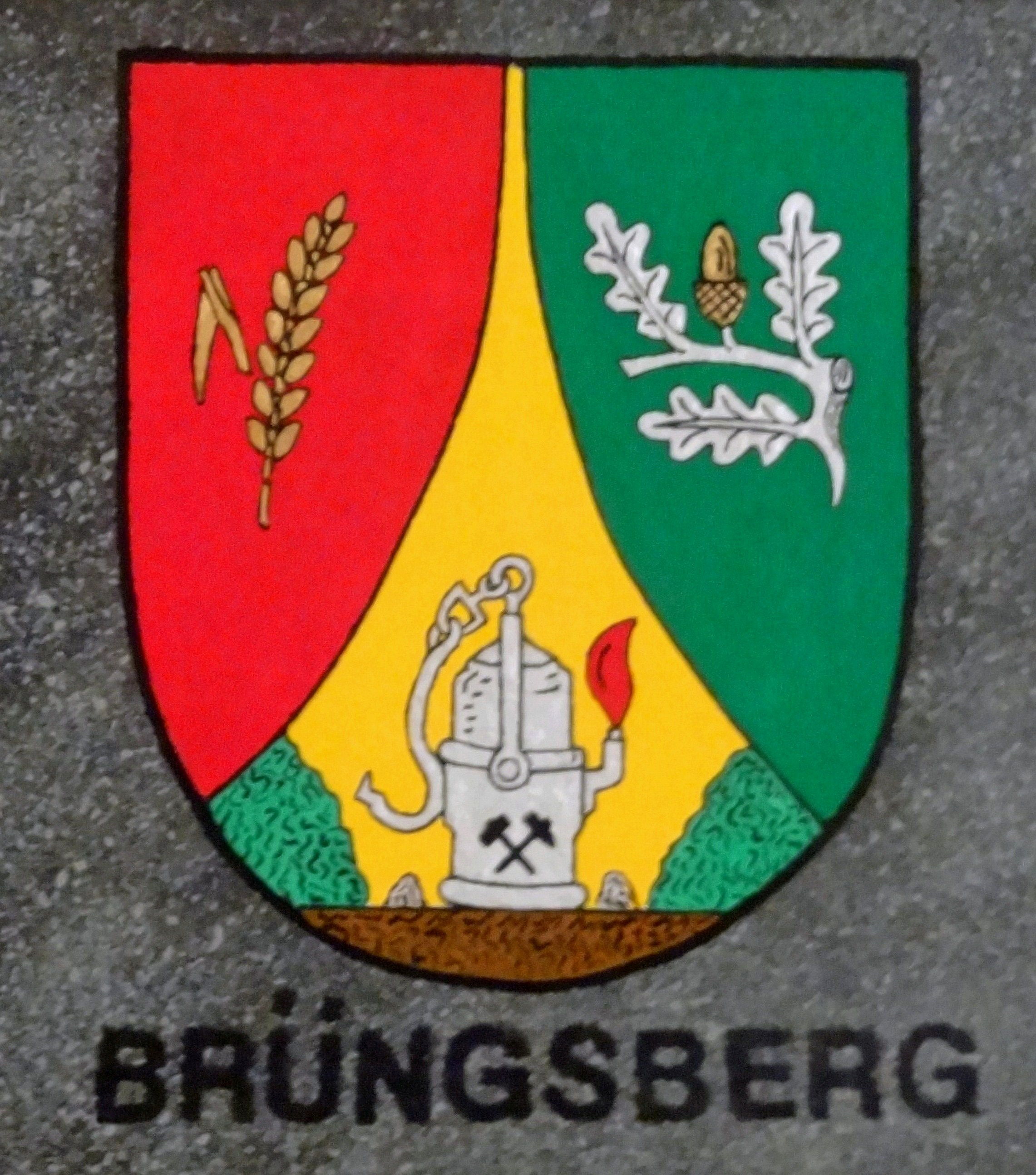 Schiefertafel als Ortswappen von Brüngsberg, erstellt von Richard Lenzgen